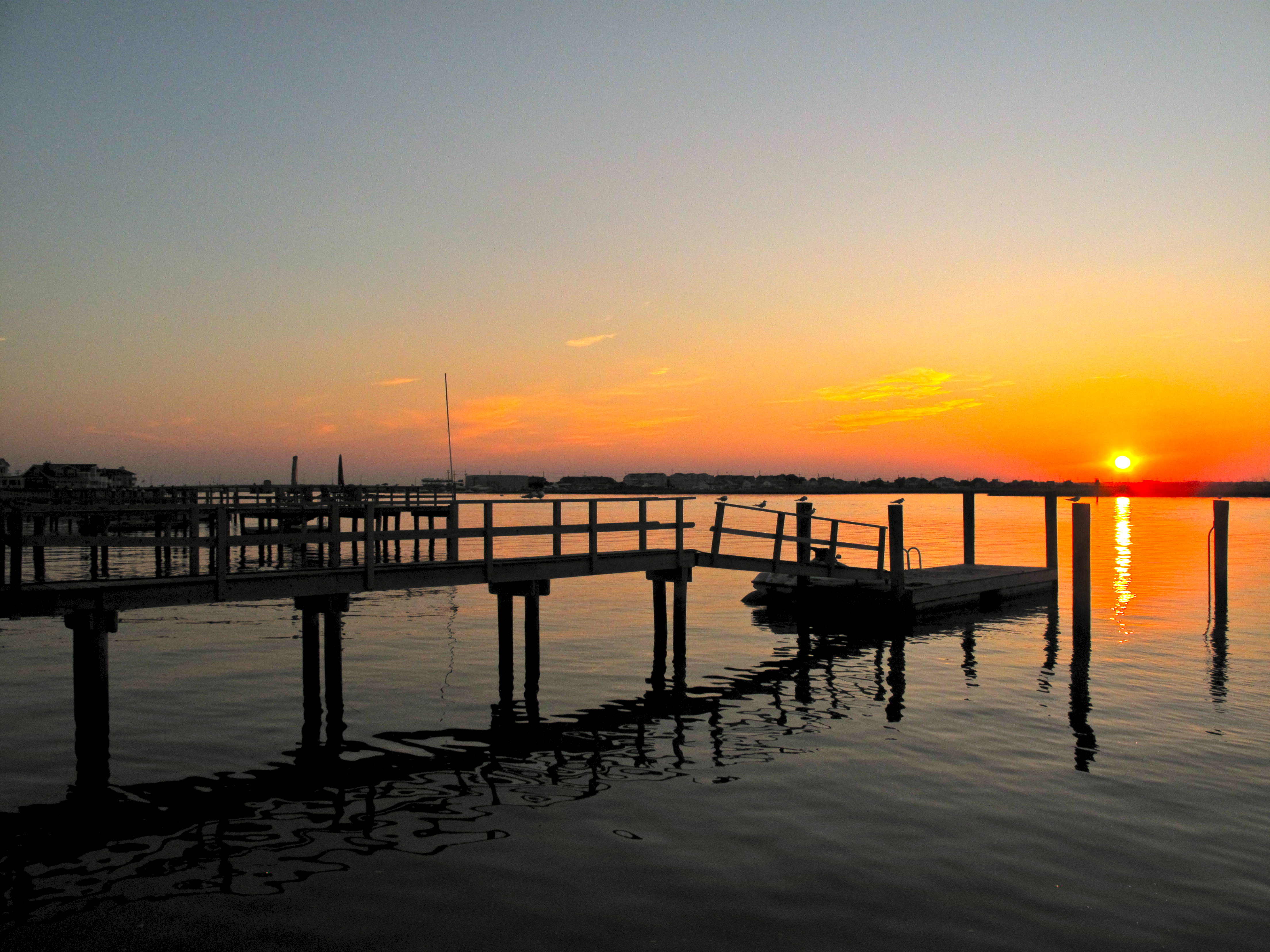 Stone Harbor sunset